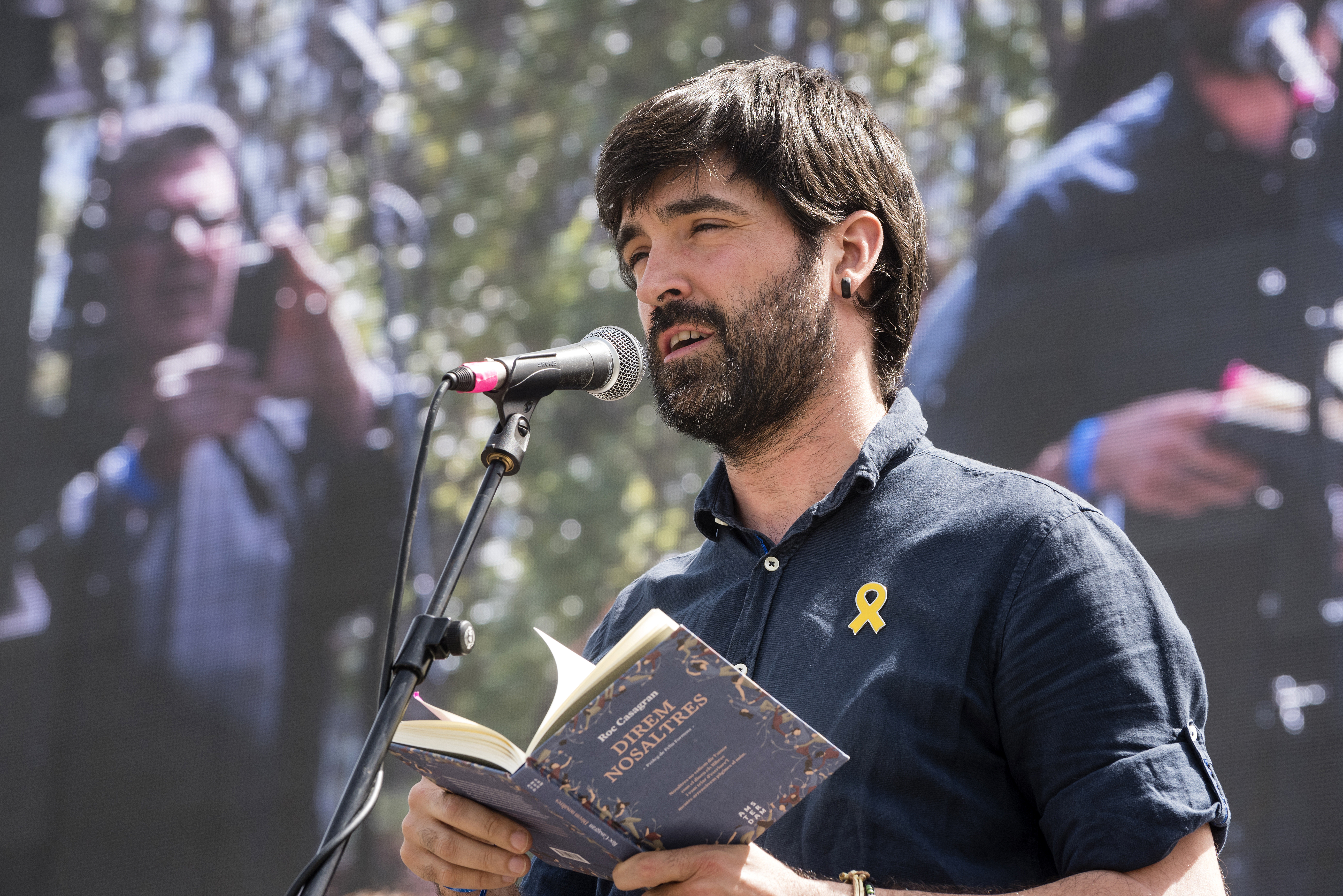 _DC72955